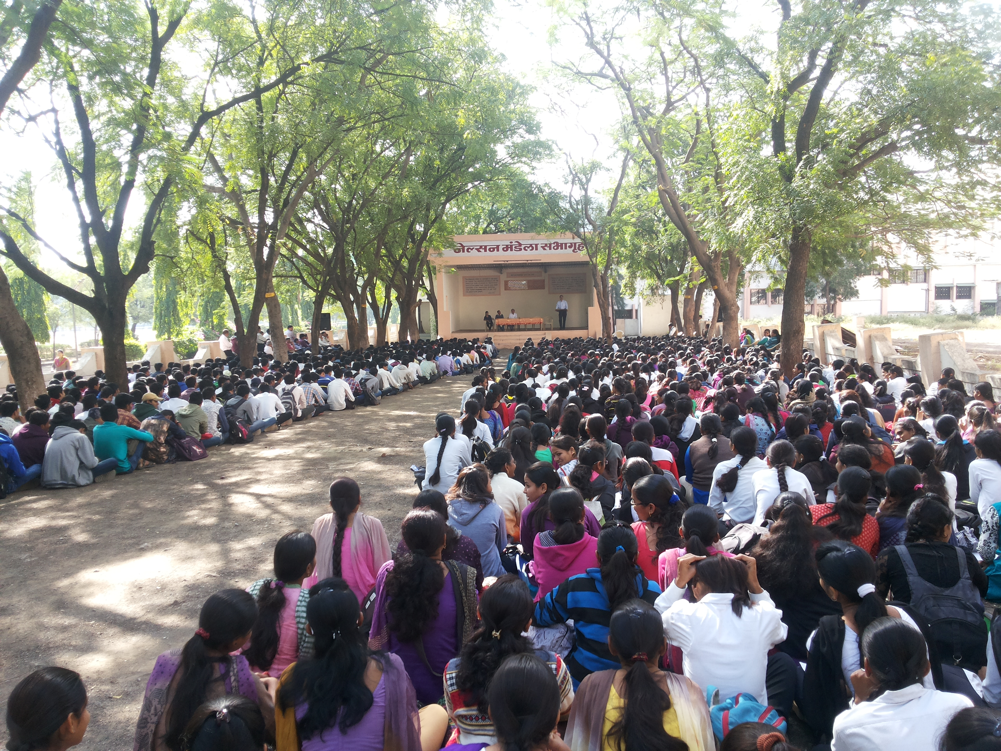 संस्थेच्या आर्थिक संकटाबाबत नेल्सन मंडेला सभागृहात विद्यार्थ्यांशी विशेष सुसंवाद साधताना कार्याध्यक्ष डॉ. संजय ओंकारनाथ मालपाणी ०८ डिसेंबर २०१५ सकाळी १०.१५ ते ११